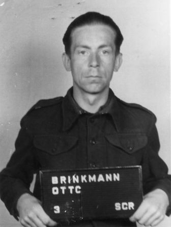 Haftbogenfoto des Angeklagten Otto Georg Werner Brinkmann (05.07.1910 in Osnabrück - 05.02.1985 in Enger, Kreis Herford), SS-Hauptscharführer, 1939-1941 Rapportführer im KZ Buchenwald; 1941-1944 Rapportführer im KZ Neuengamme; 1944 Rapportführer im KZ Mittelbau-Dora; Oktober 1944 - April 1945 Schutzhaftlagerführer im Außenlager Ellrich-Juliushütte des Konzentrationslagers Mittelbau-Dora, im Dachauer Dora-Prozess ("Case No. 000-50-37 Dora") am 30.12.1947 zu lebenslanger Haft verurteilt, 09.05.1958 vorzeitige Entlassung.